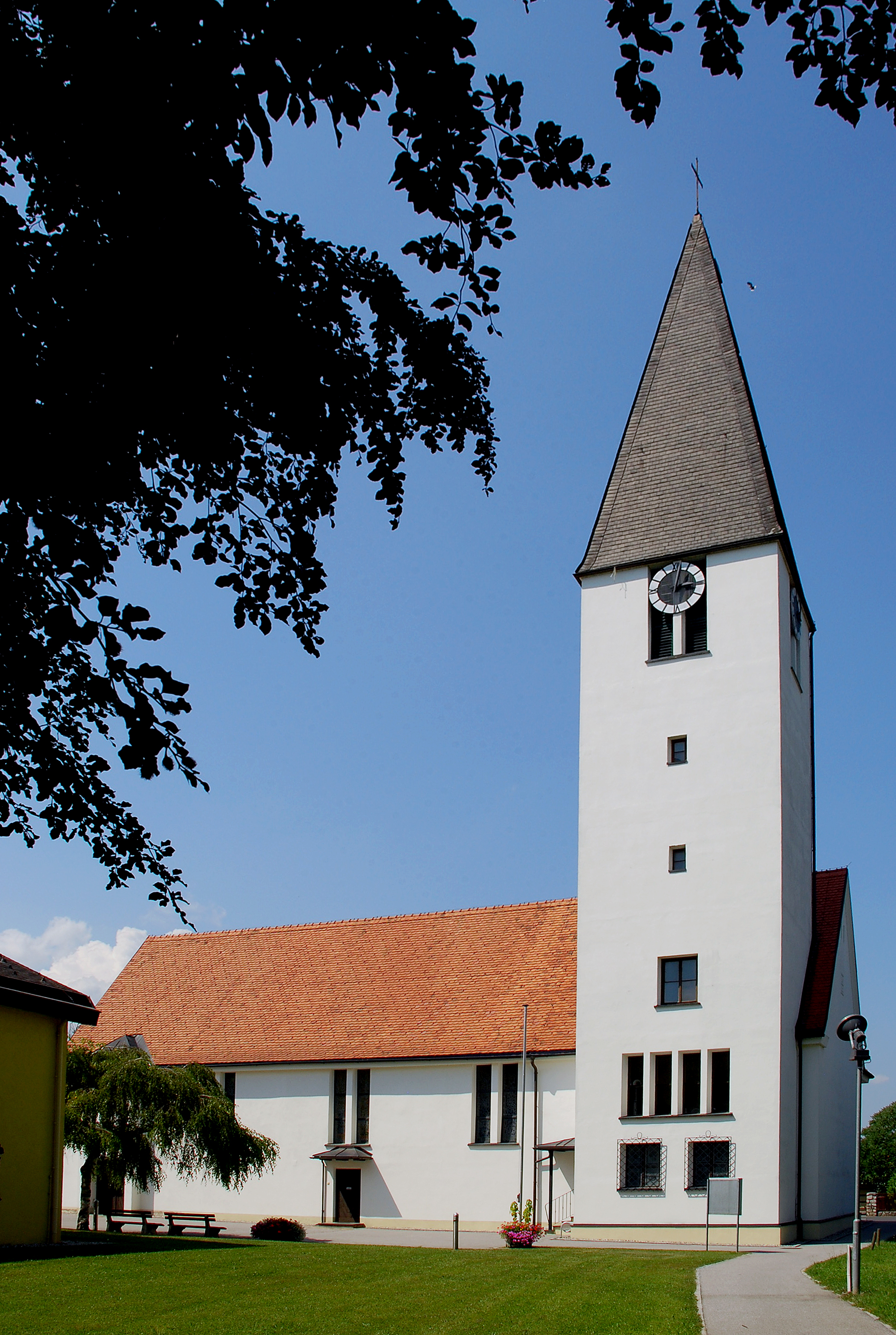 Frauental, Steiermark, Österreich: Pfarrkirche